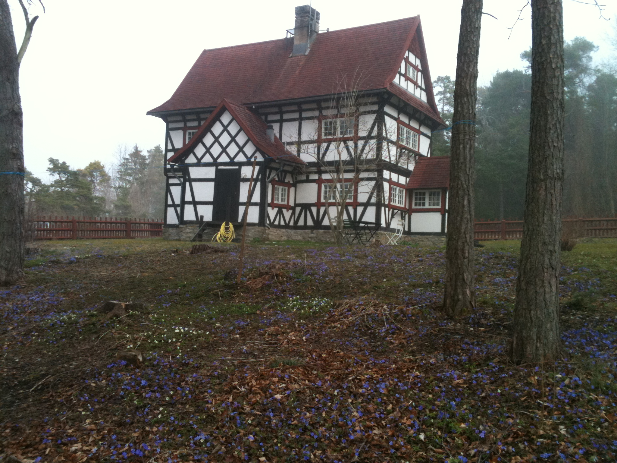 Brucebo korsvirkeshuset, i blåsippetid